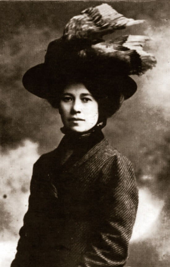 Fedora Bartošová, ca 1910